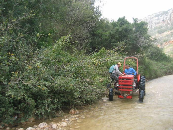 צורי חוצה את הנחל בלי להרטב